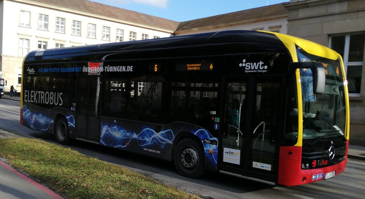 eCitaro der Stadtwerke Tübingen im Linienbetrieb